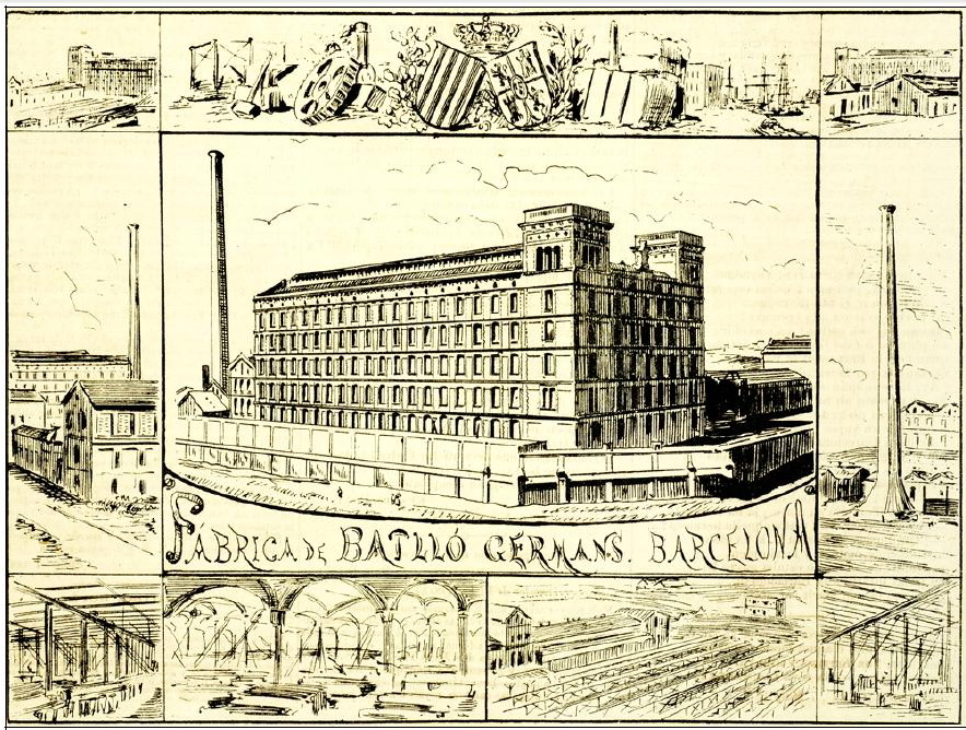 Dibuix de l'empresa "tèxtil Batlló i Batlló" de Barcelona (Catalunya), apareguda a la "Llumanera de Nova York" el 1875